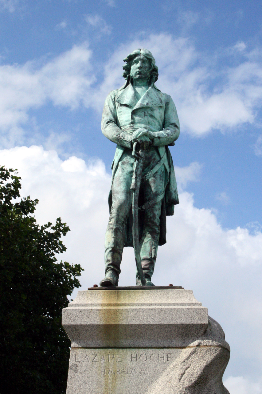 Monument élevé à la mémoire de Lazare Hoche à Quiberon, par Jules Dalou. Inauguré le 20 juillet 1902.